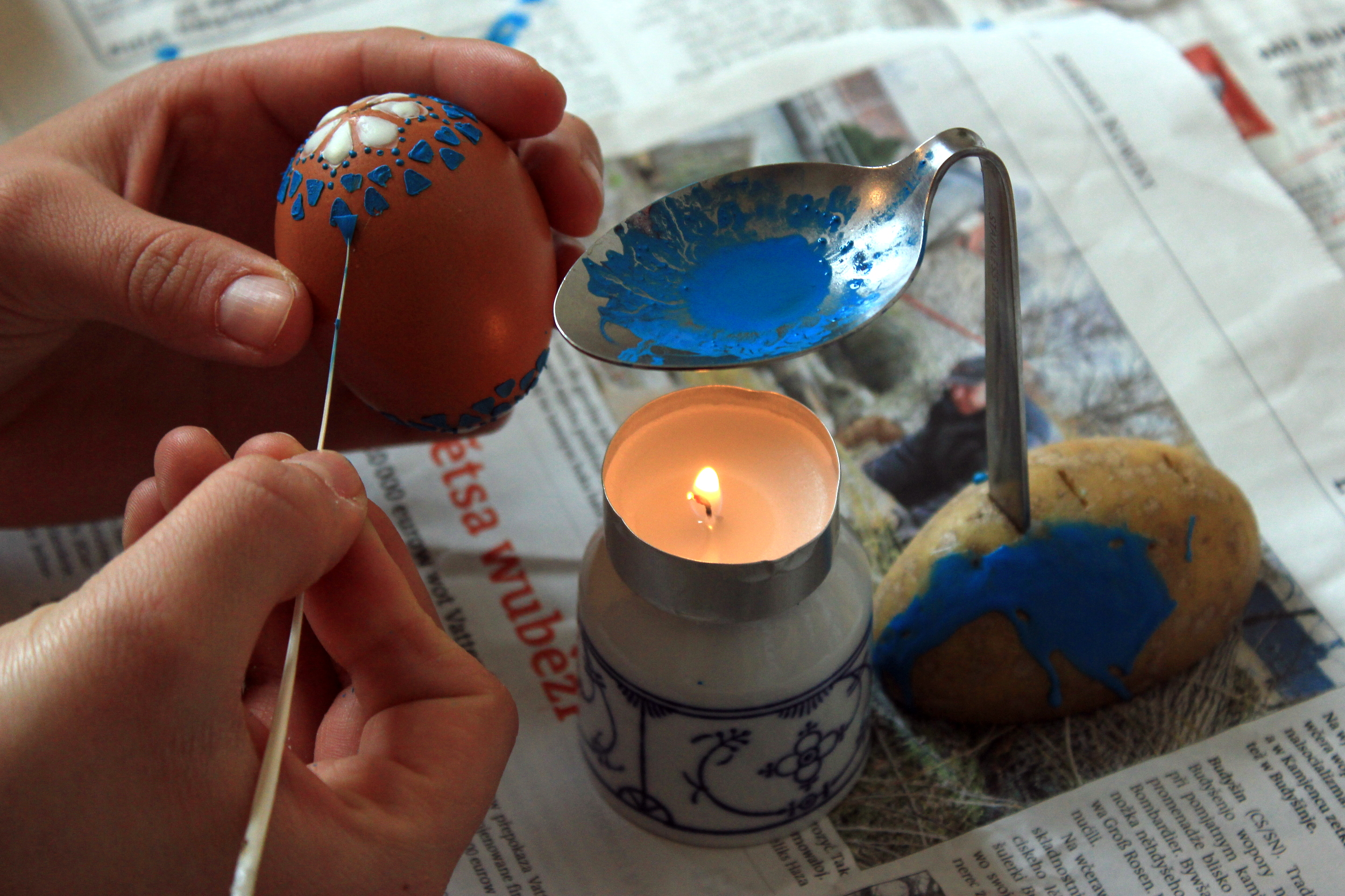 Hornjoserbsce: Wóskowanje jutrowneho jejka.